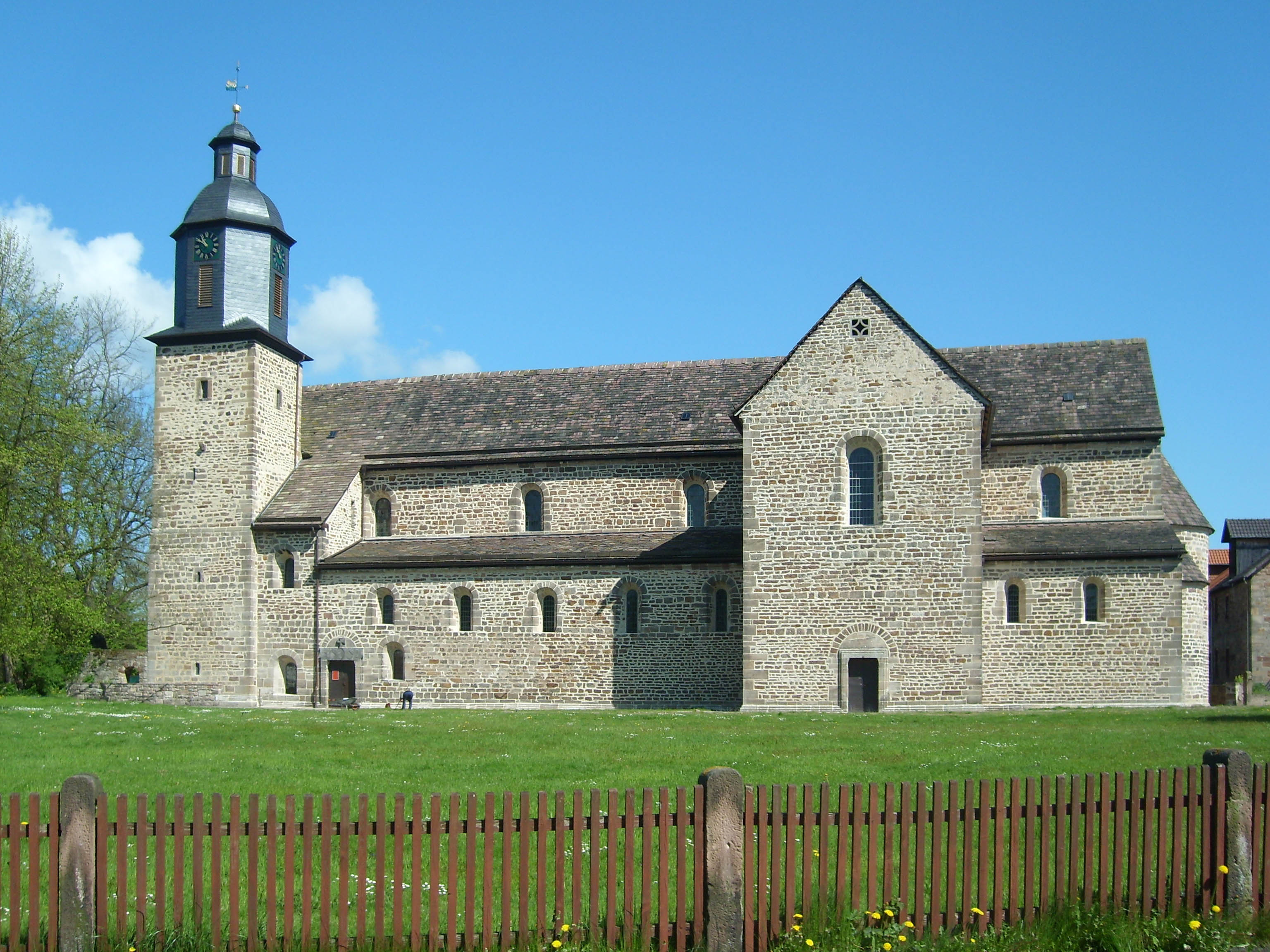 Klosterkirche in Lippoldsberg.